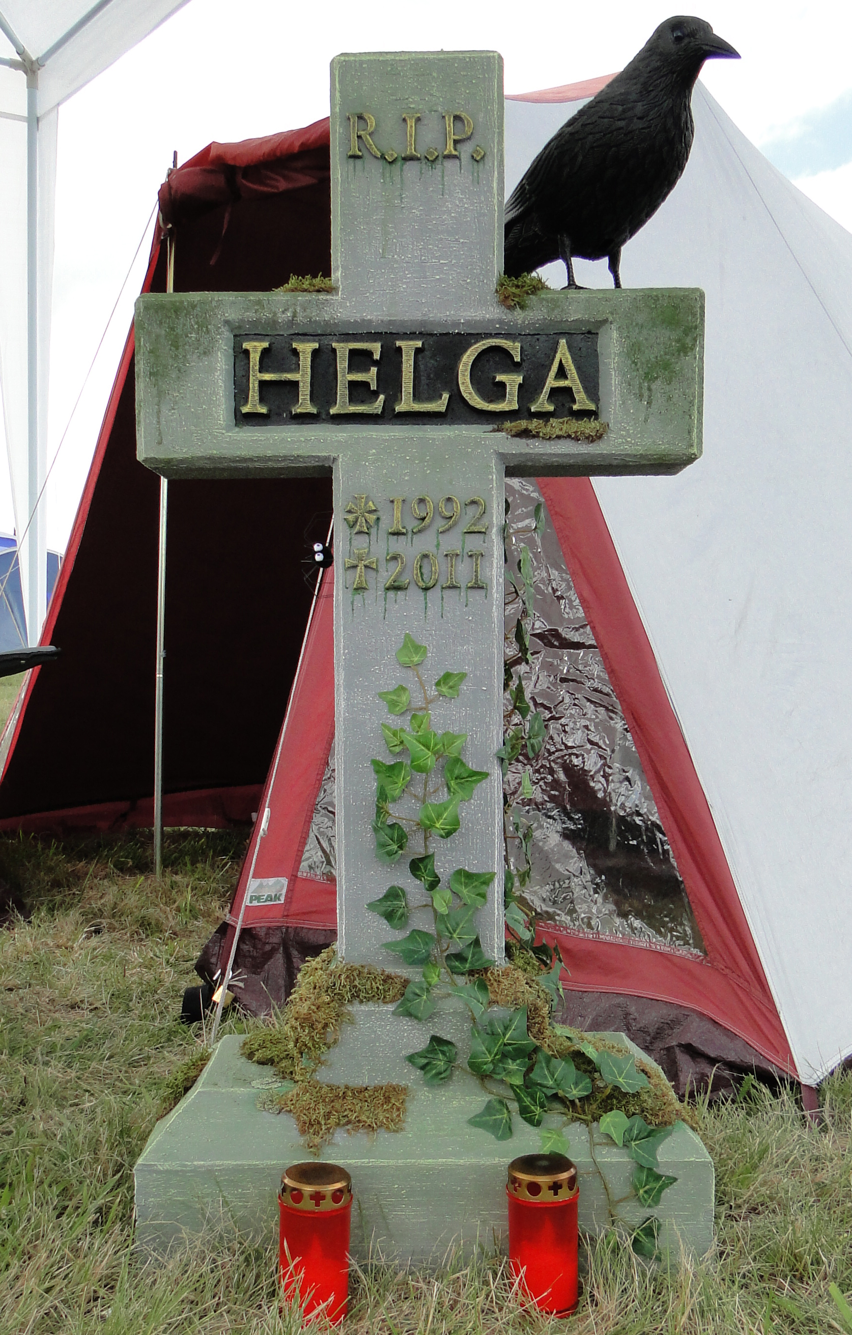 Helga Grabstein auf dem M'era Luna 2012 in Hildesheim